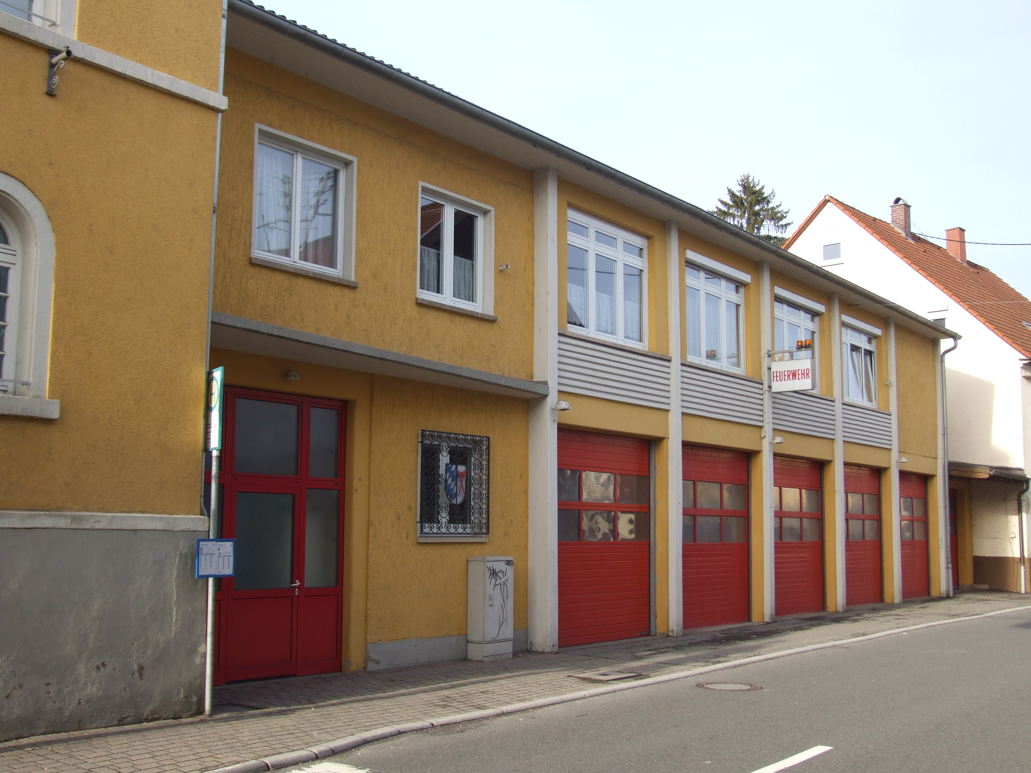 Feuerwehrgerätehaus Eschelbronn